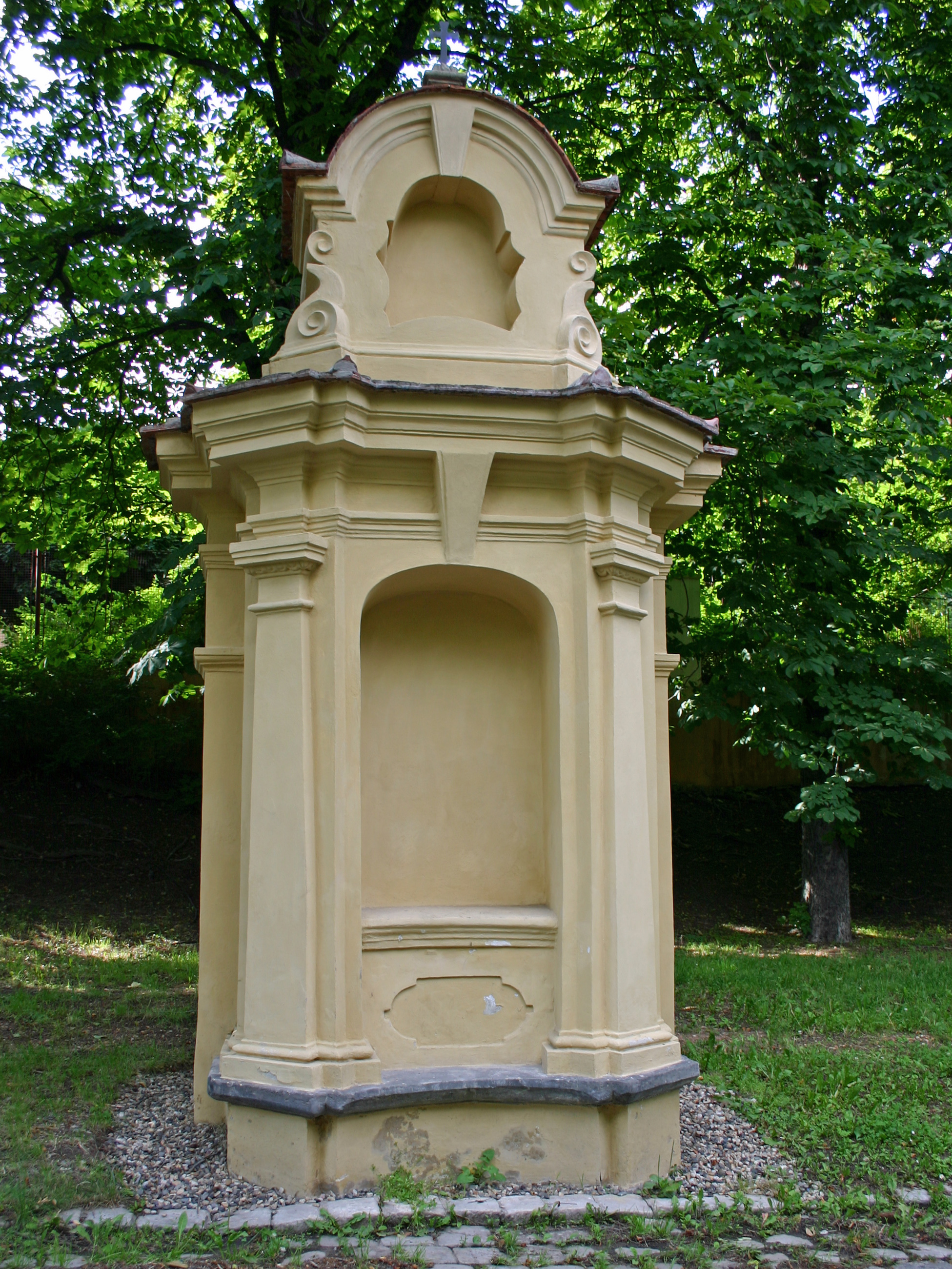 Kaplička křížové cesty v Mostě na Zahražanech v ulici Žižkova